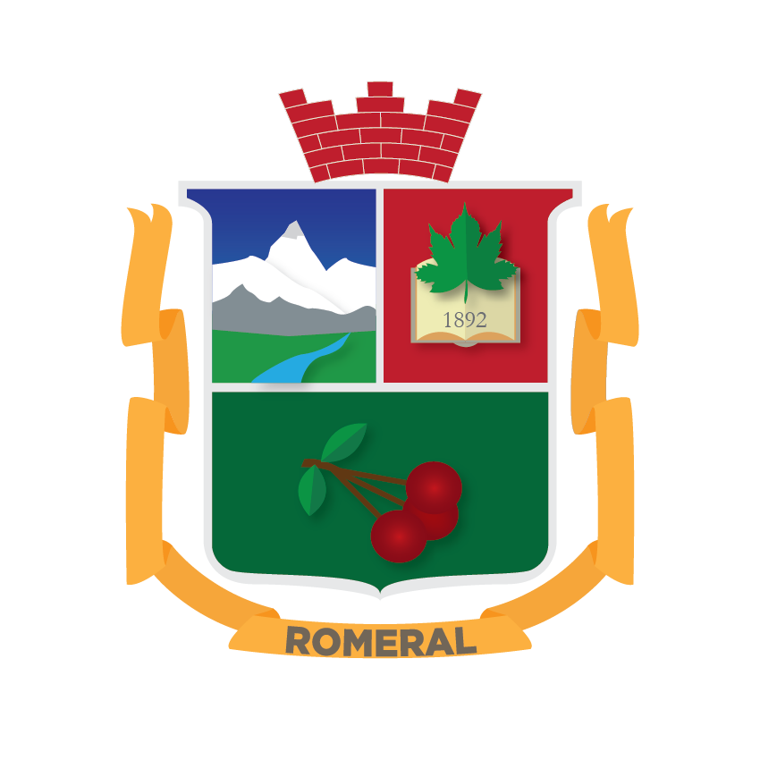 Escudo de Armas de la comuna de Romeral, Provincia de Curicó, Región del Maule.